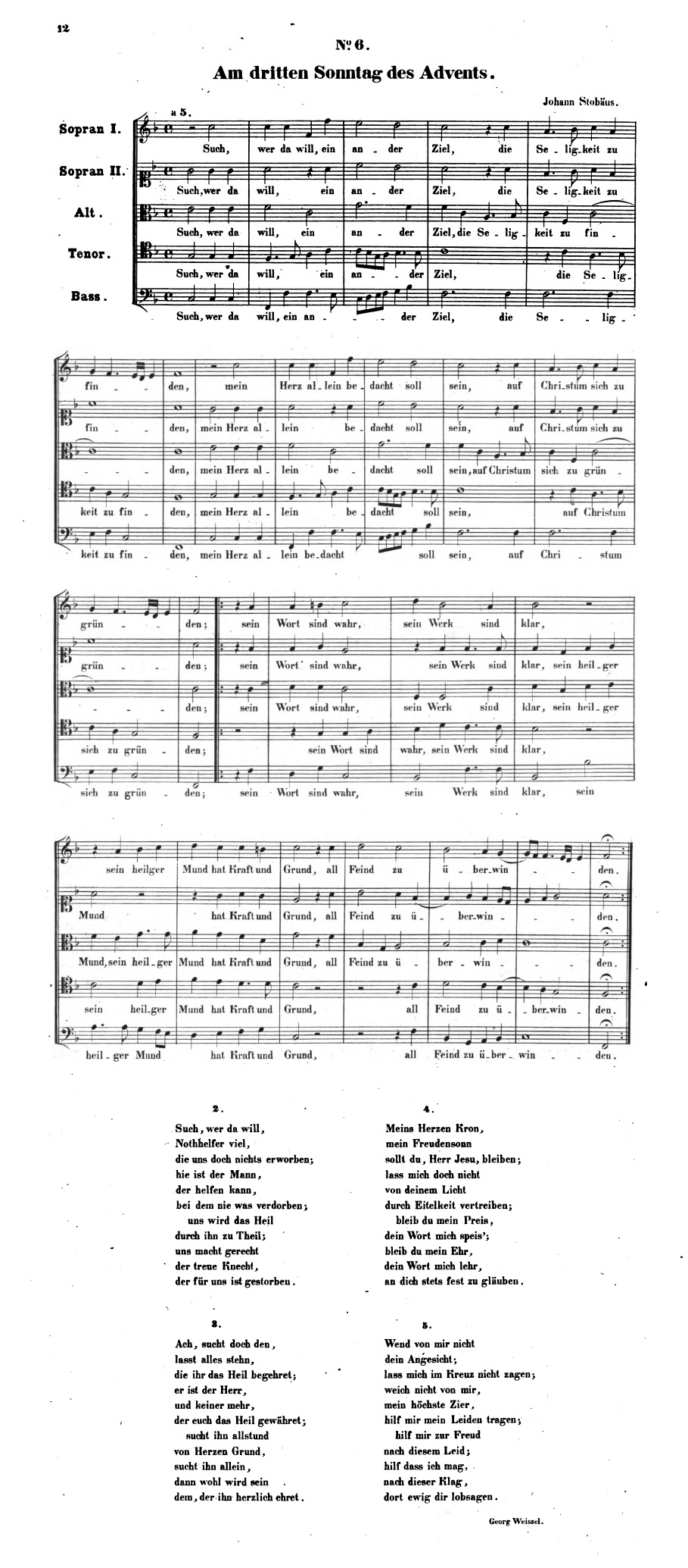 Such, wer da will, ein ander Ziel, Melodie und fünfstimmiger Chorsatz von Johann Stobäus